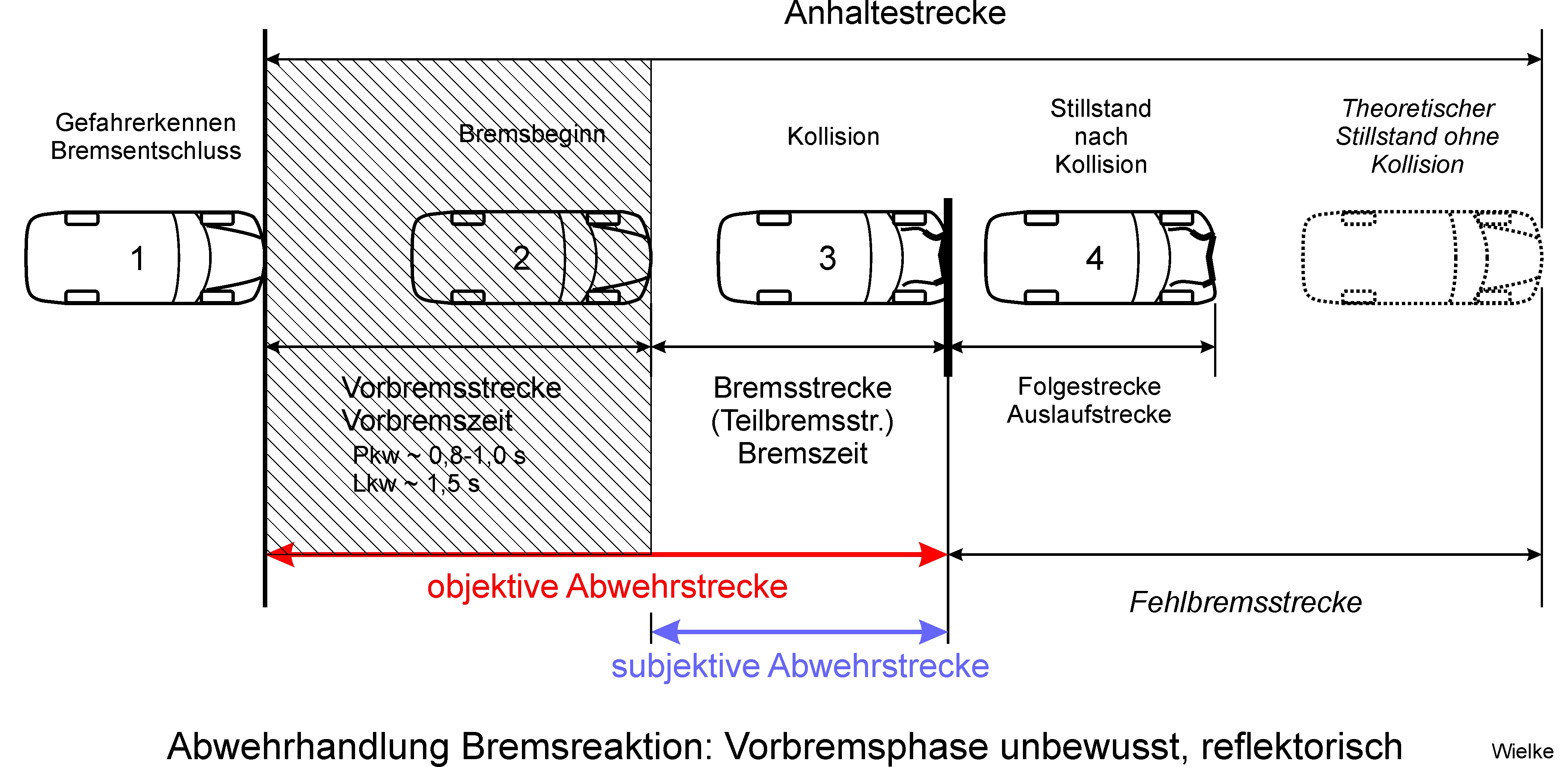 Bremsreaktion und Erinnerung: Die Vorbremsphase (schraffierter Bereich) bleibt nicht in Erinnerung, weil sie unbewusst abläuft